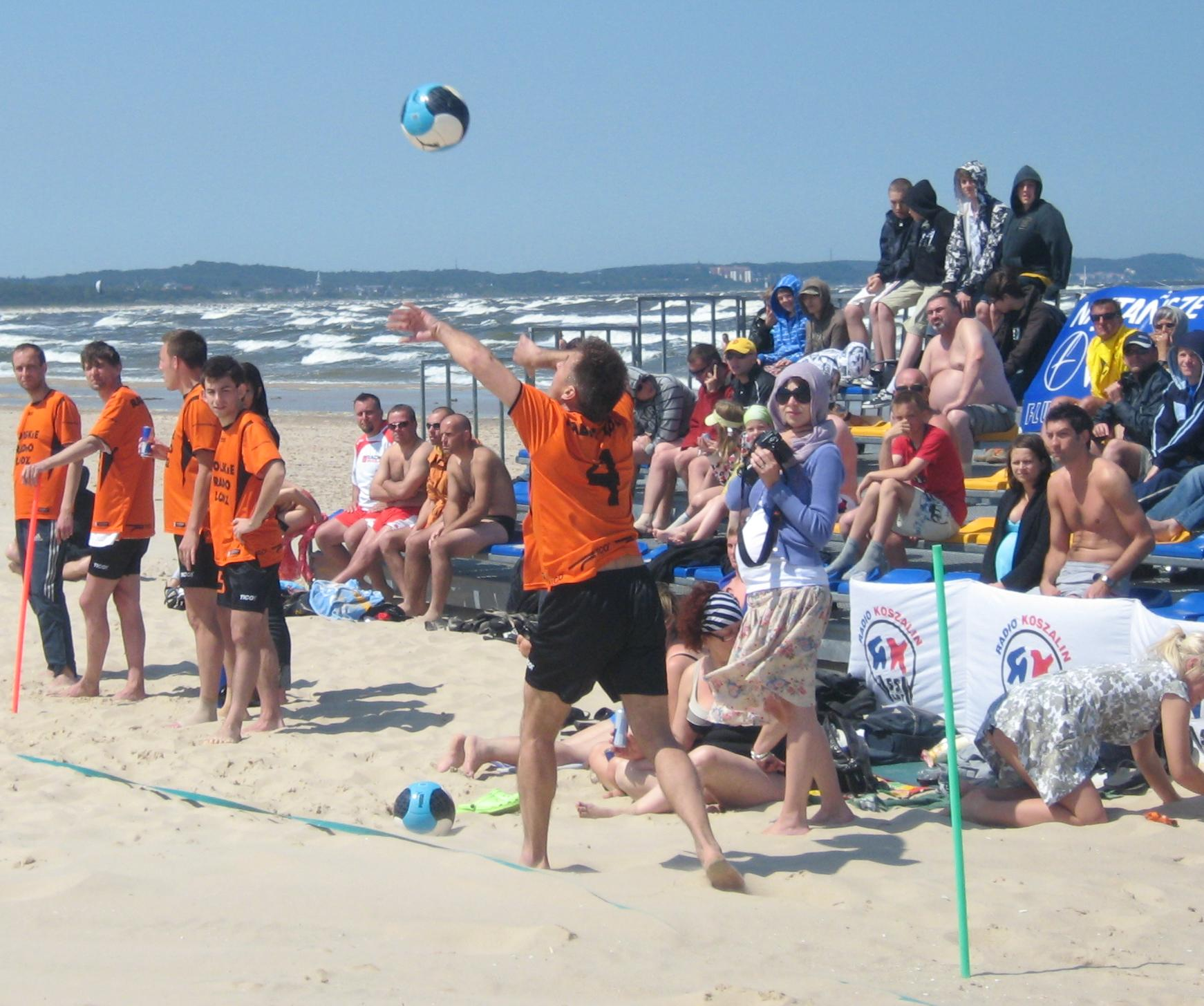 Baltic Radio Cup. Mecz o pierwsze miejsce pomiędzy Radiem Łódź (pomarańczowi) a radiem PiK (błękitni)